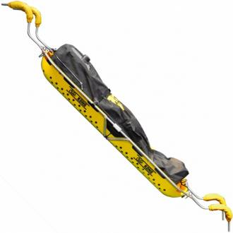 Barella per il soccorso in forra